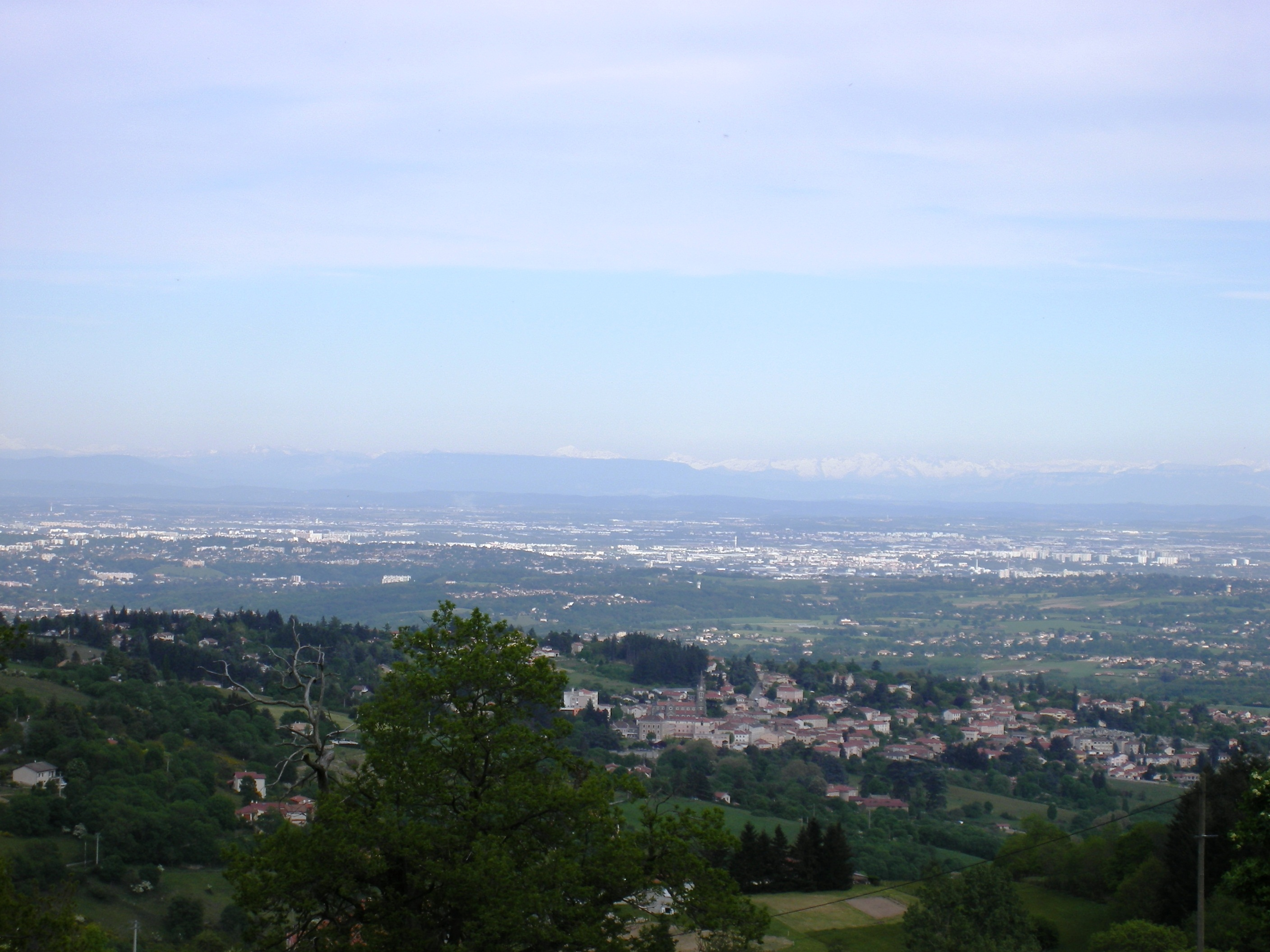 à partir les collines dans l'ouest